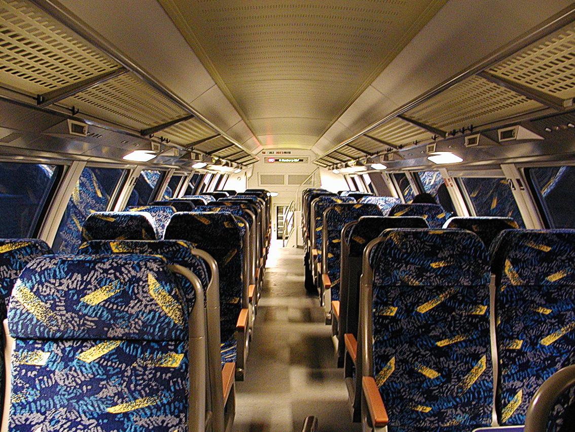 Im metromom nach Hamburg